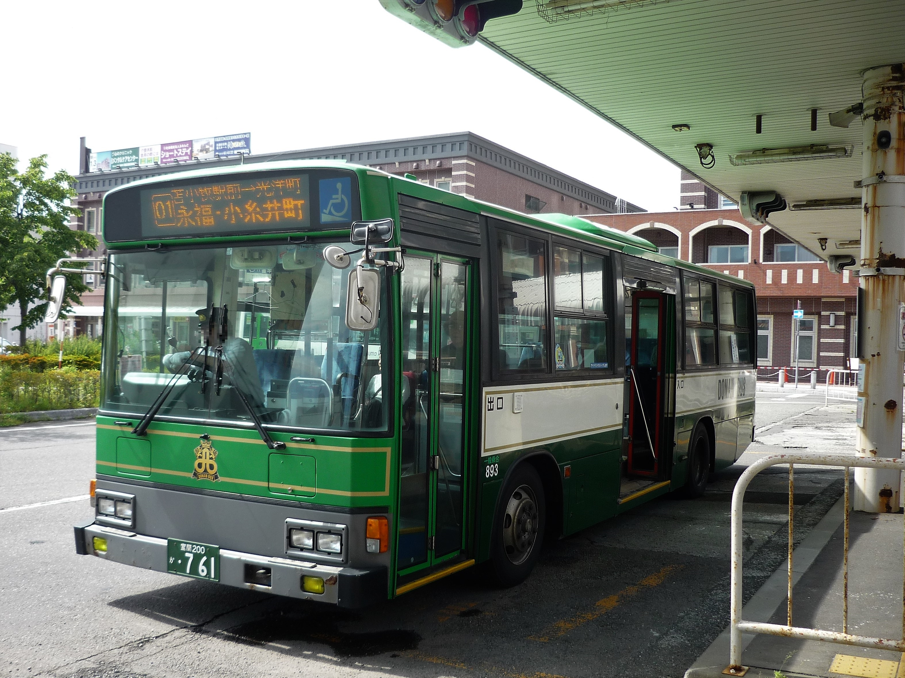 苫小牧駅前に停車中の道南バス